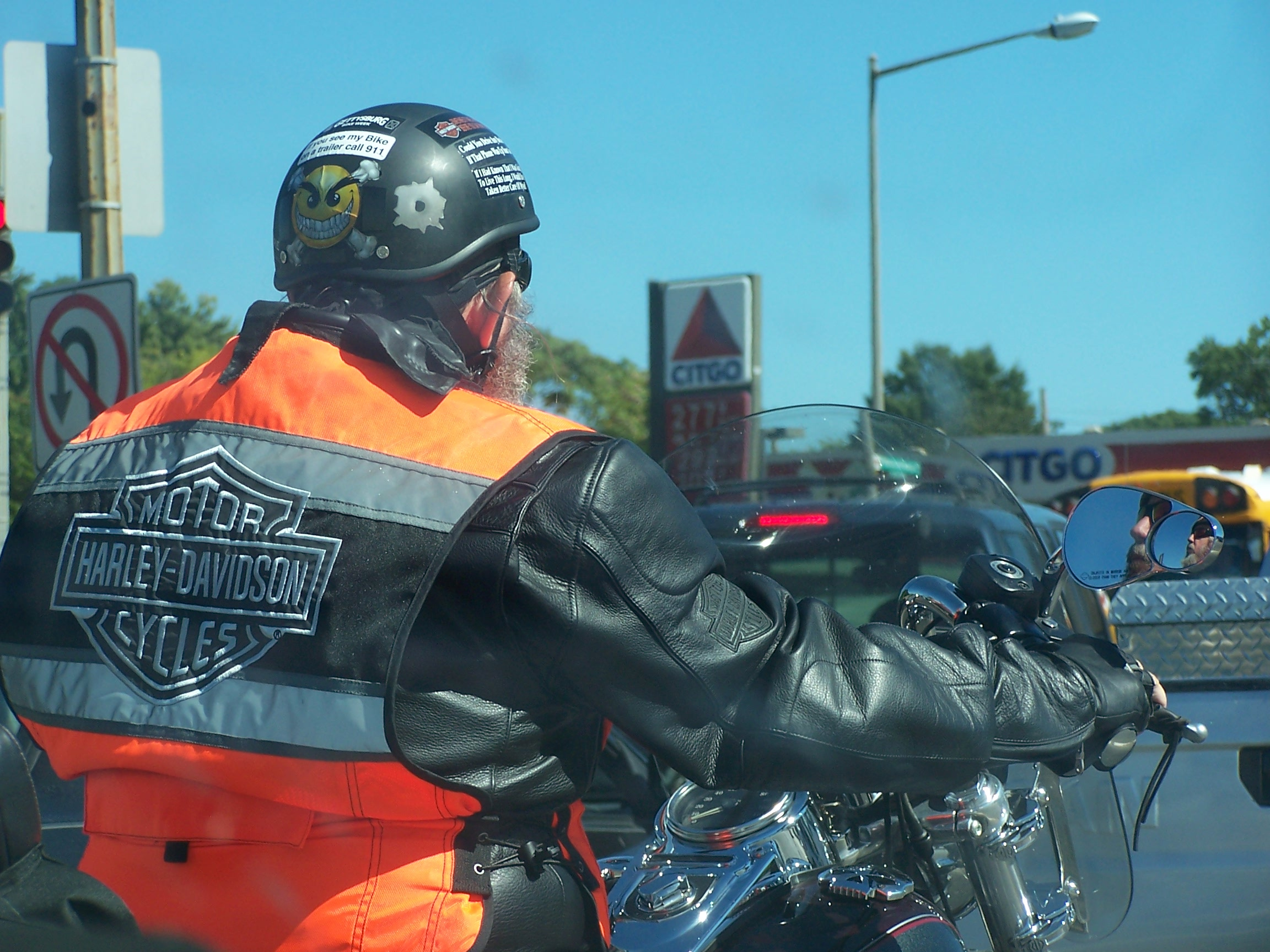 motero